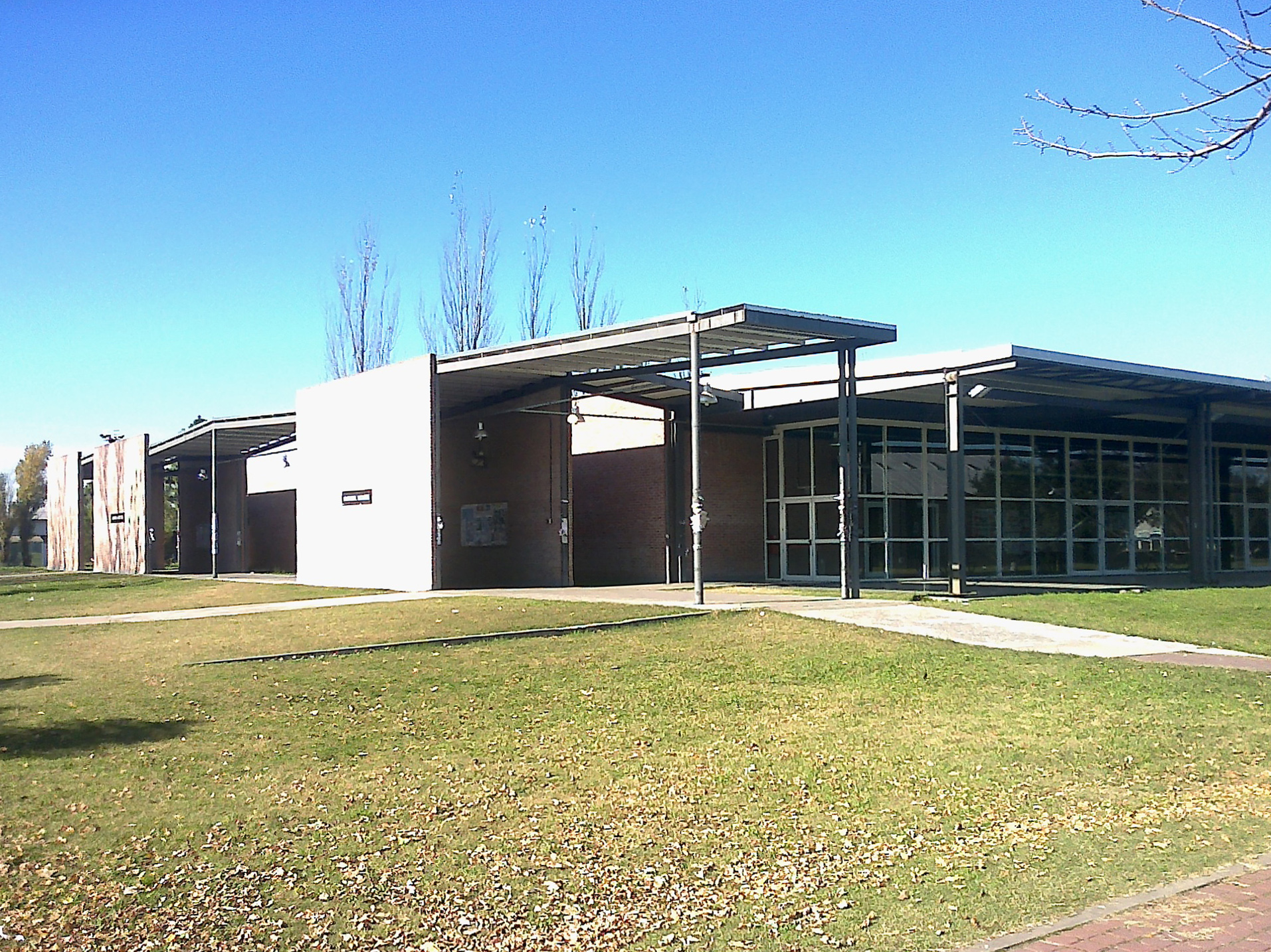 Edificios Manuel Ugarte (primero) y Arturo Jauretche (atrás) de la Universidad Nacional de Lanús.